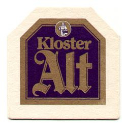 Das Bild zeigt das Logo der "Biersorte Kloster Alt", produziert durch die ehemalige Klosterbrauerei Pröpsting aus Hamm.